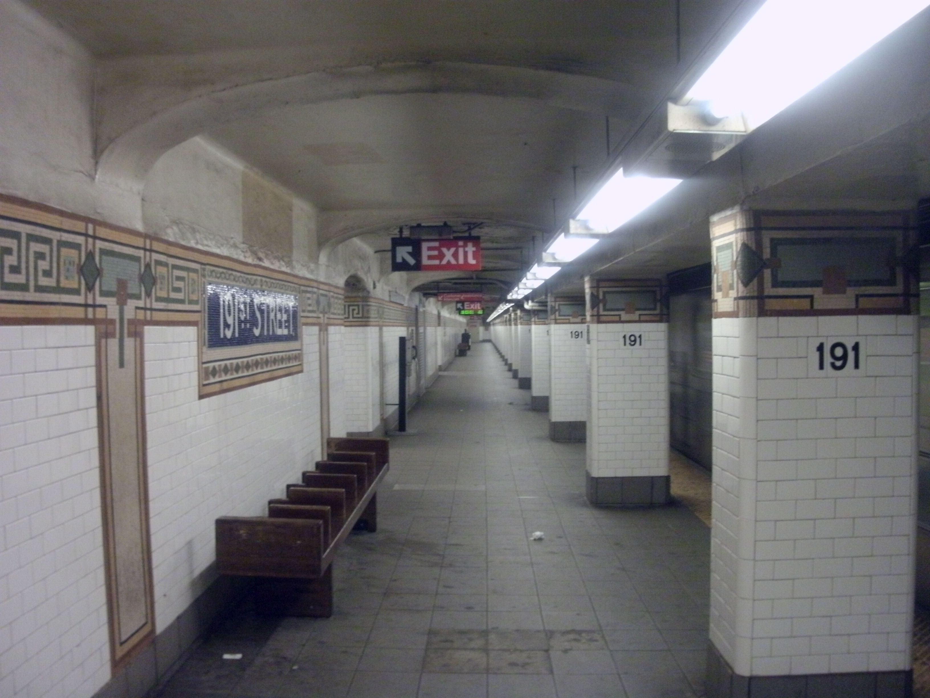 Ge digital camera